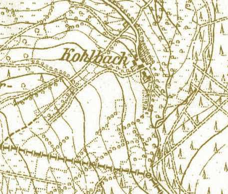 Der Hof Kohlbach in der thüringischen Rhön bei Schleid.